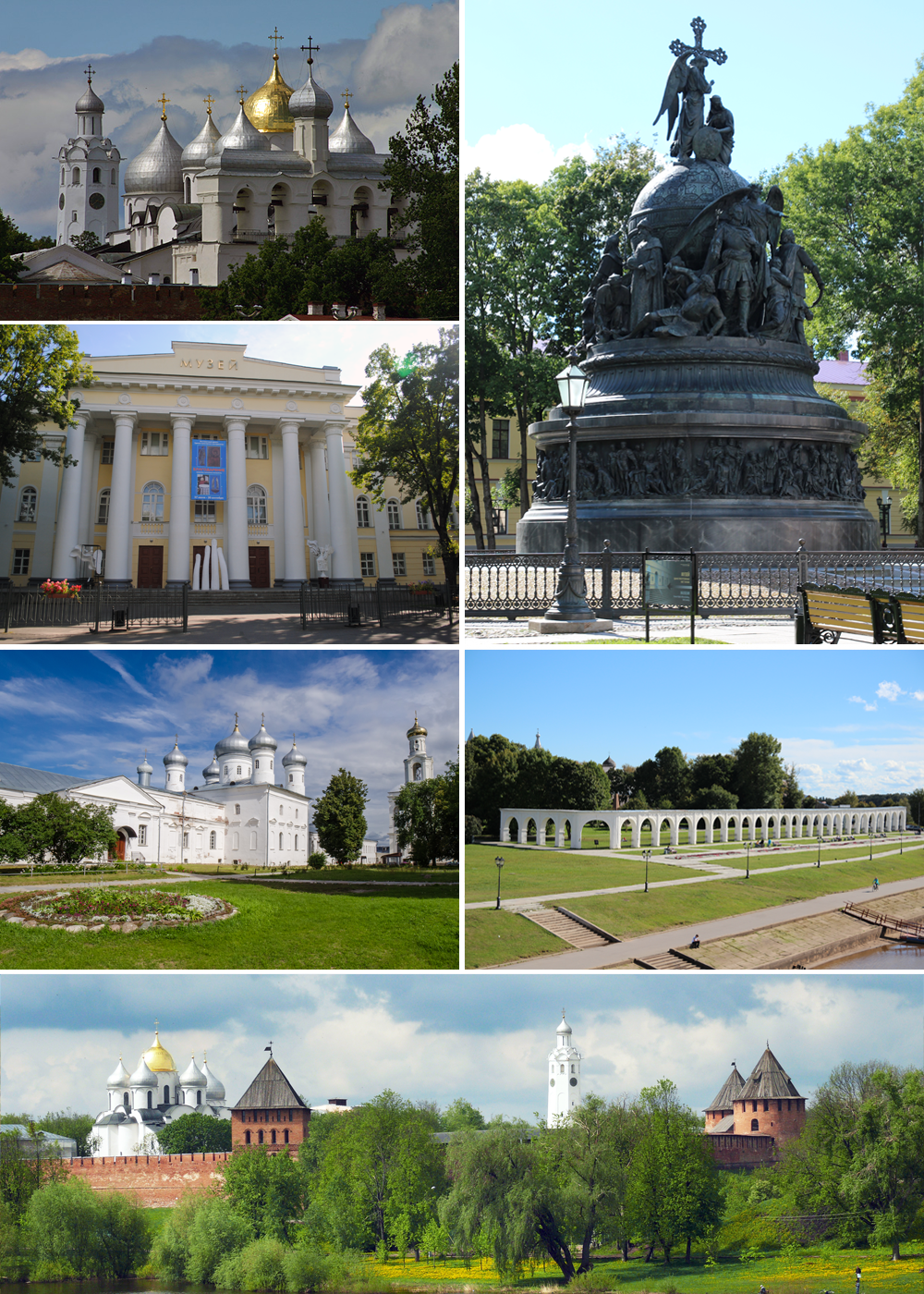 Коллаж для страницы о Великом Новгороде из фотографий